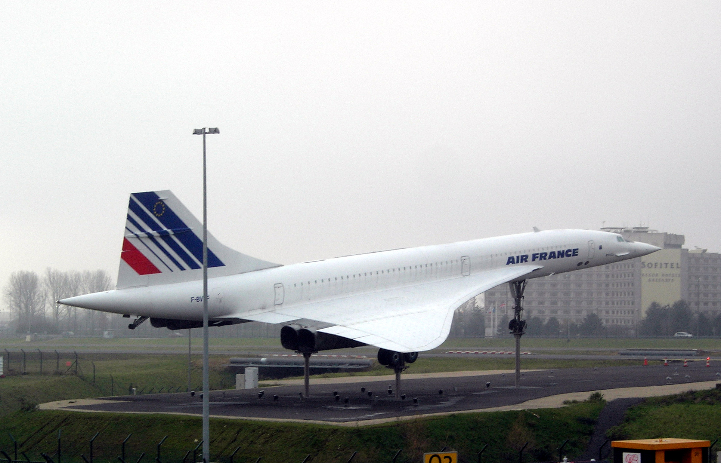 Description =Concorde exposé sur l'aéroport de Roissy Source =Photo taken by Remi Jouan Date =Décembre 2006 Author =Remi Jouan